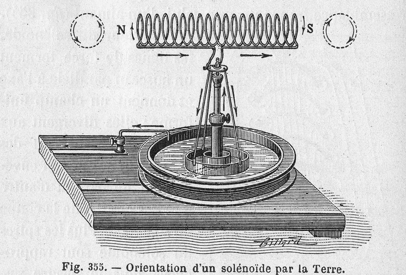 Illustration de l'action de la force électromagnétique